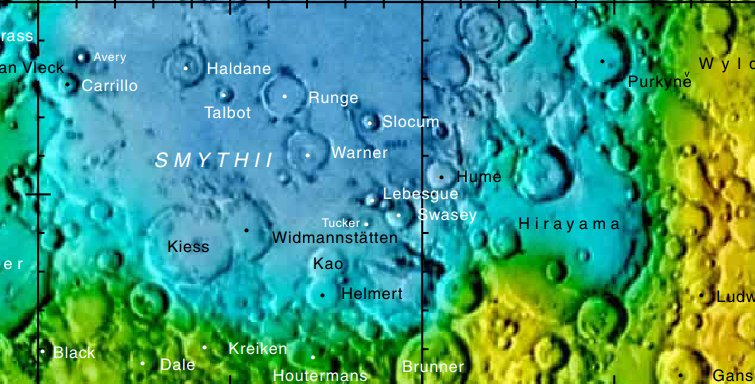 Cráter lunar Tucker. Localización. (Imagen LRO)